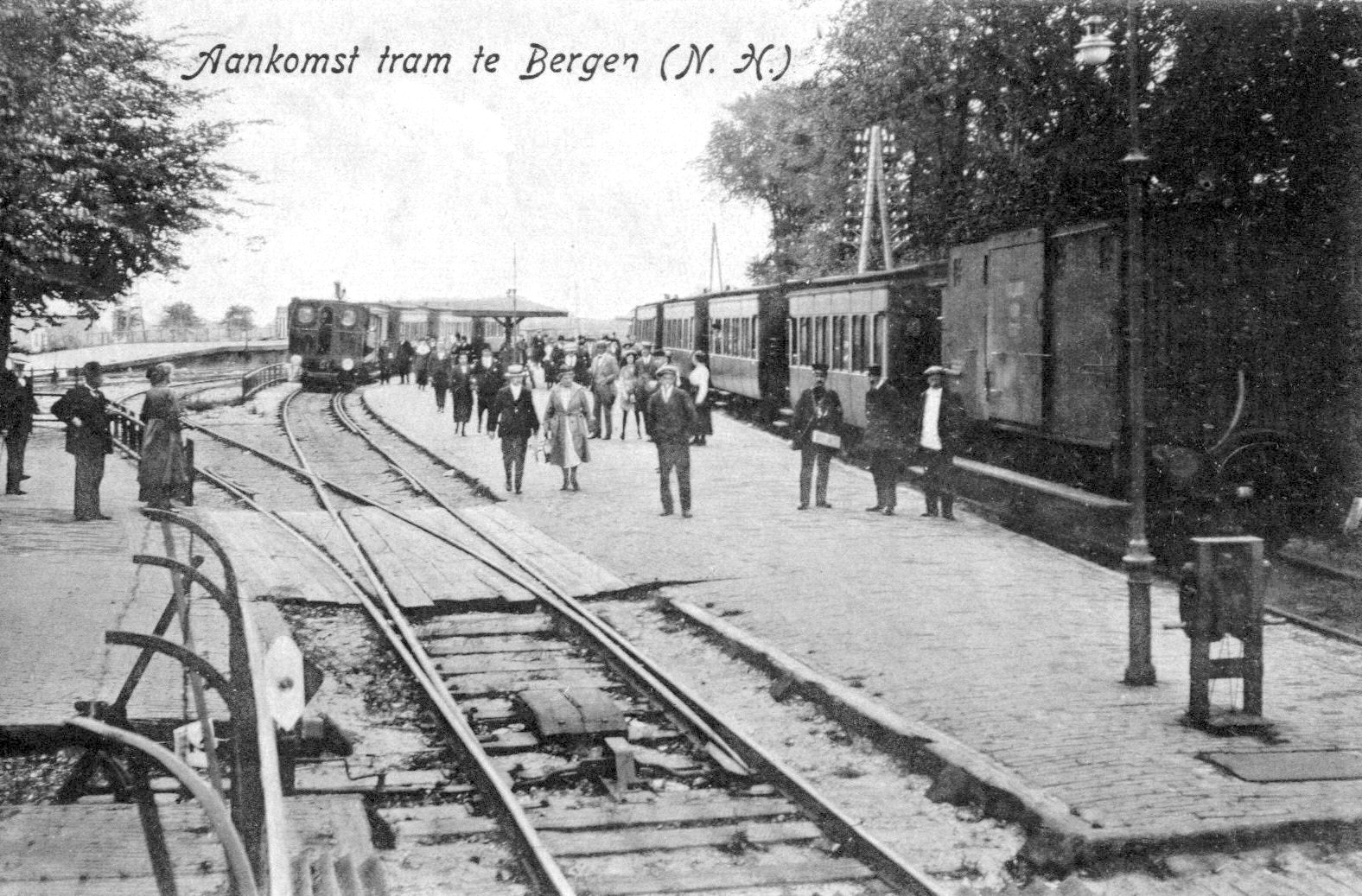 Tramstation te Bergen (N.H) aan de tramlijn Alkmaar-Bergen aan Zee, na aankomst van een tram; circa 1920. Collectie van het Utrechts Archief.